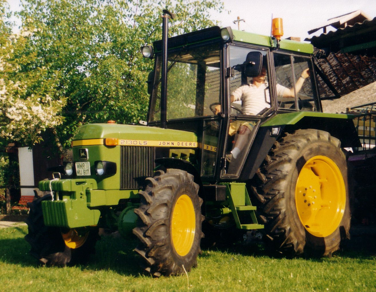 John Deere 2130 LS mit Allrad, Lastschaltgetriebe und FSC-Kabine